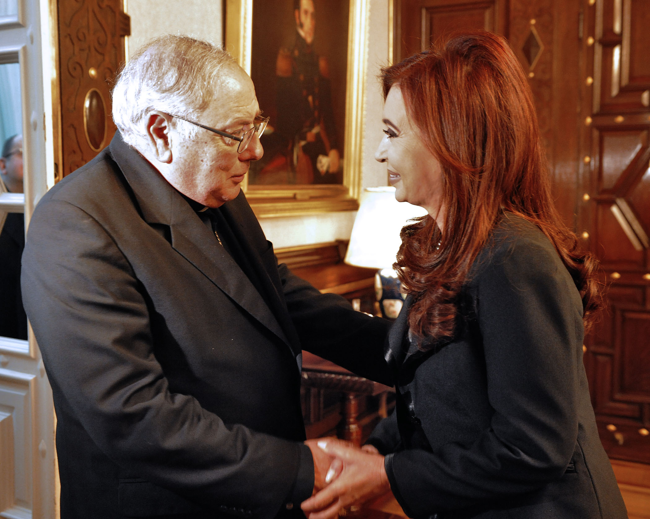 La presidenta Cristina Fernández saluda al flamante titular de la Conferencia Episcopal Argentina, el arzobispo de Santa Fe, José María Arancedo, durante una audiencia en el despacho presidencial de Casa de Gobierno.